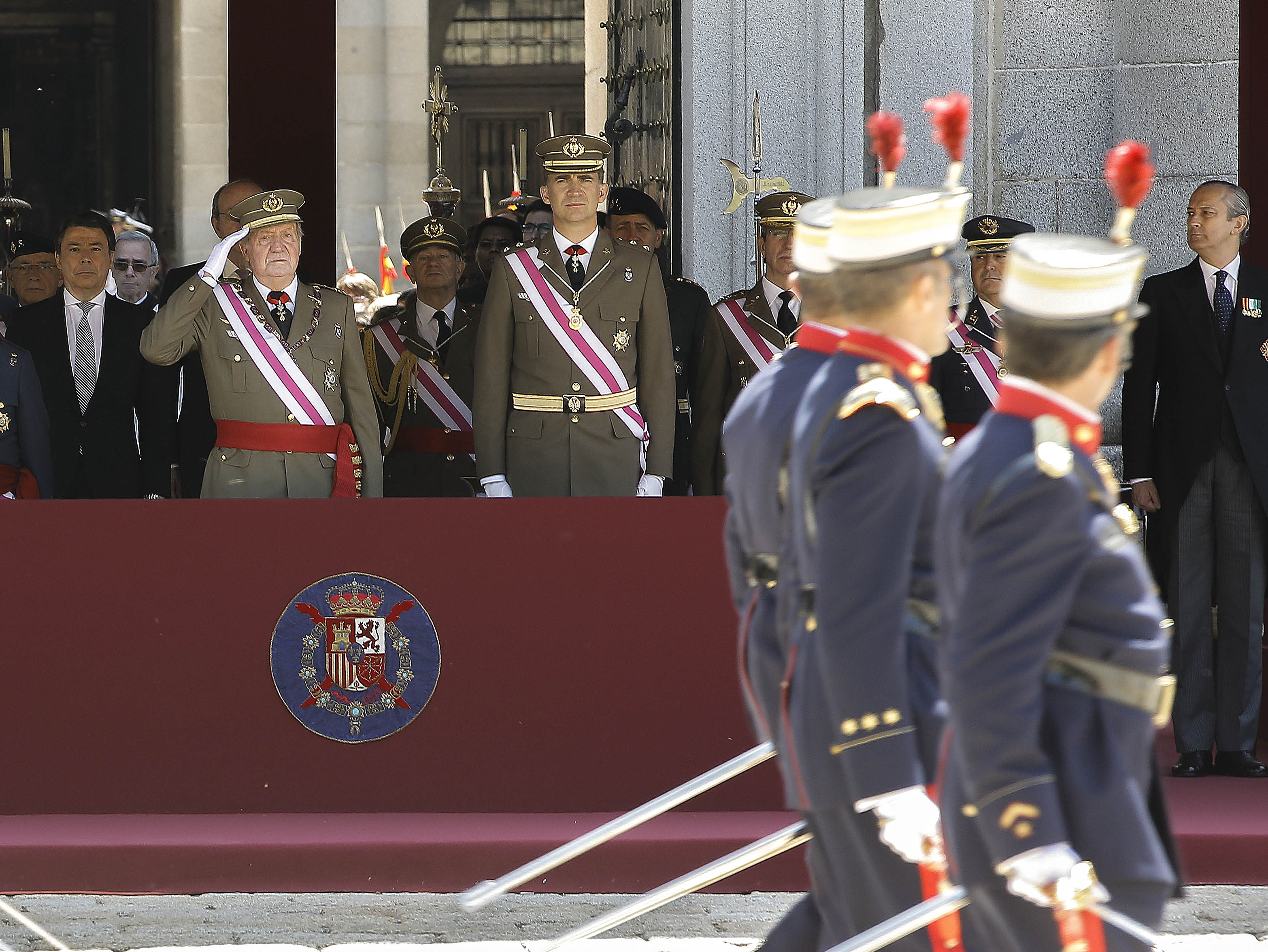 Conmemoración del segundo centenario de la creación de la Orden de San Hermenegildo